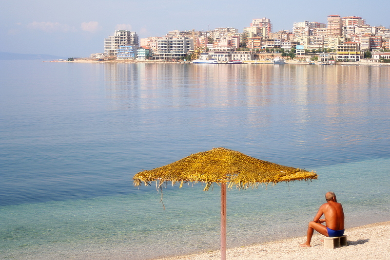 Sarandë, Albania